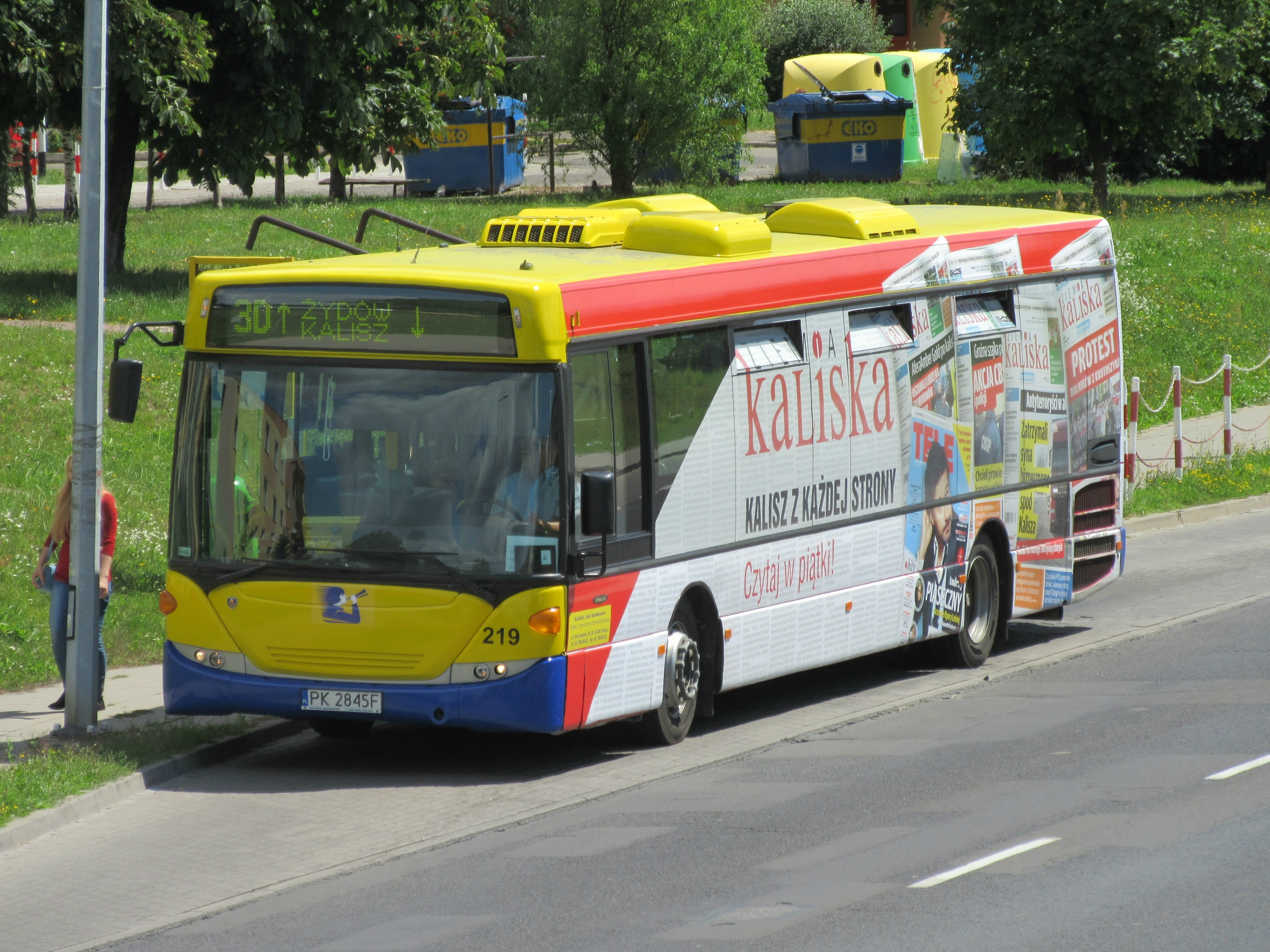 Scania OmniLink (CK270UB) Kaliskich Linii Autobusowych na przystanku Sawickiej Arena (ob. Wyszyńskiego Arena) w Kaliszu